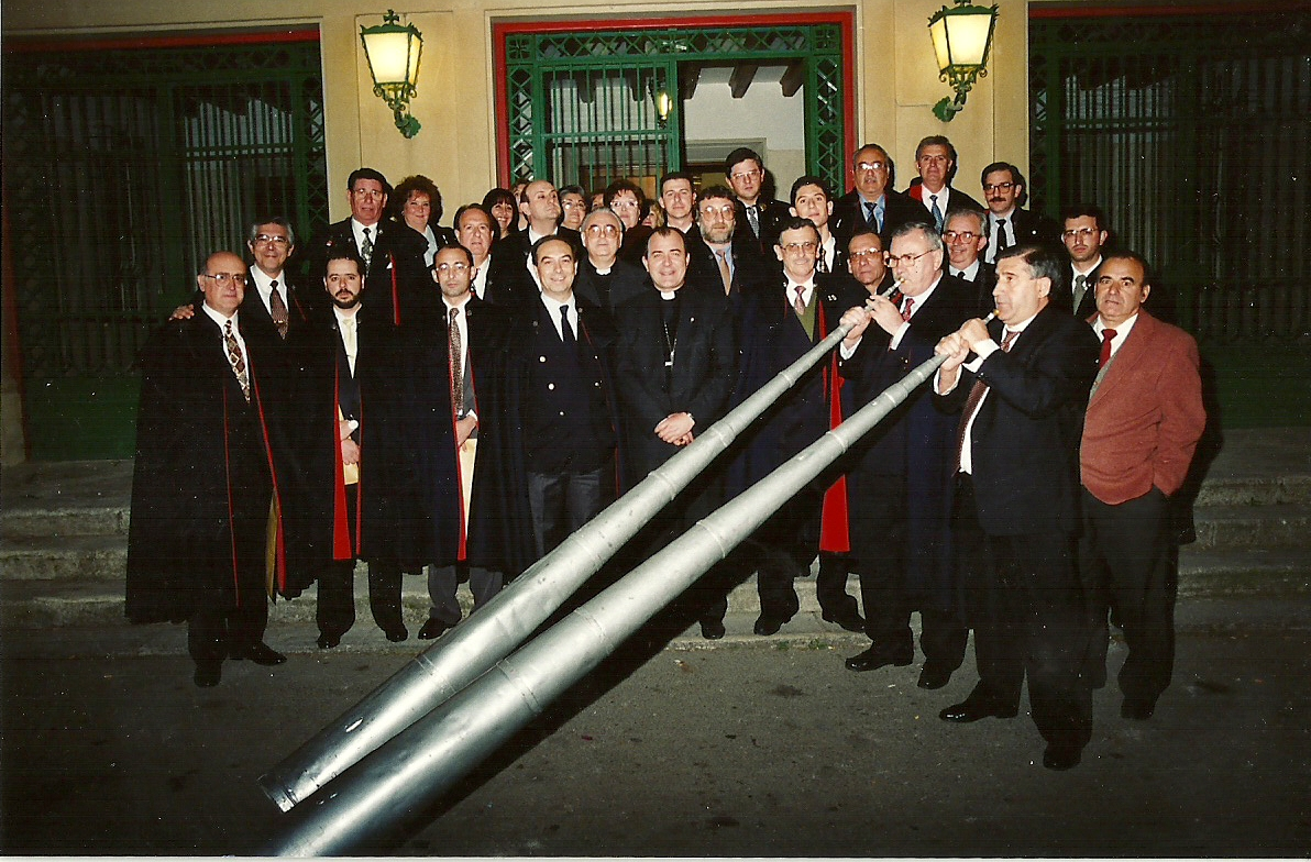 Actuación Albacete año 1997